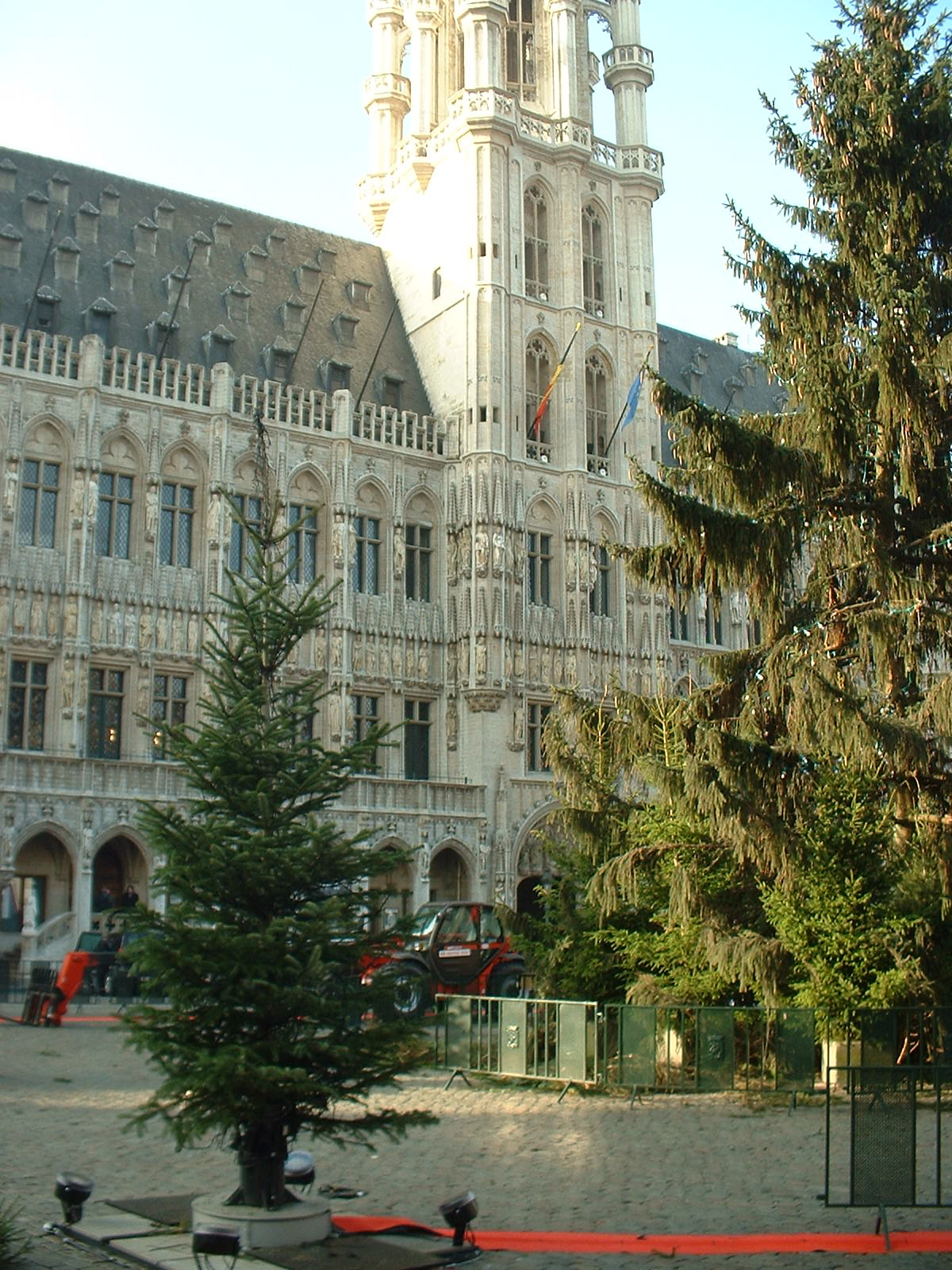 Grand-Place in Brussels